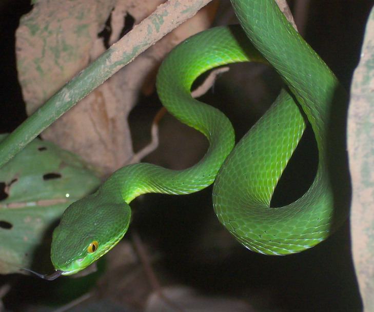 Trimeresurus albolabris from Cikelepa river, Jabranti, Kuningan, West Java, Indonesia